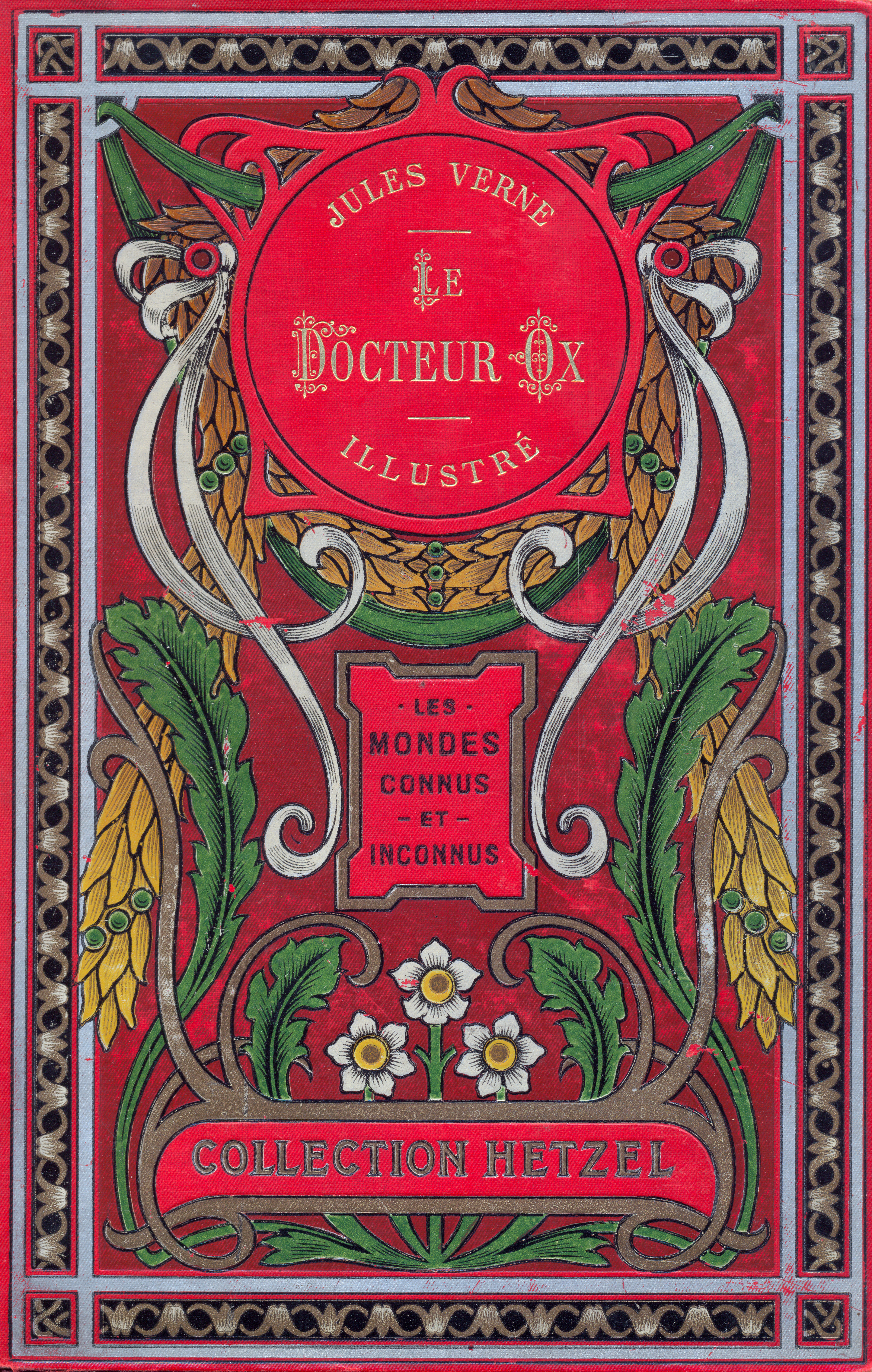 Couverture du livre "Le Docteur Ox"